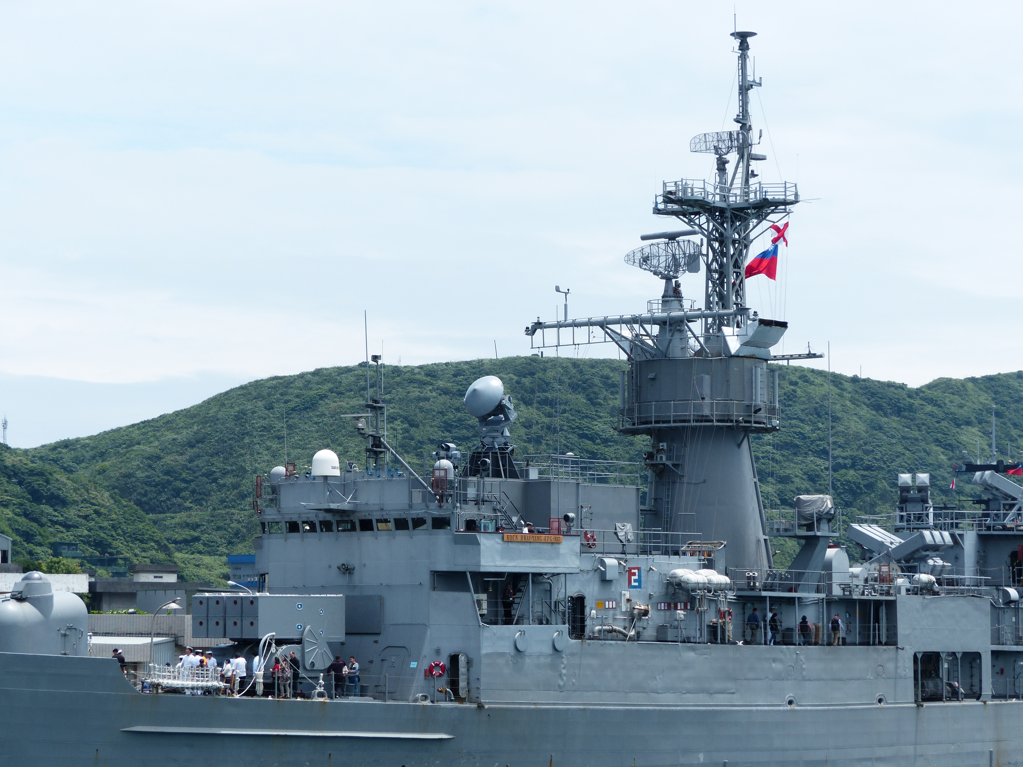 濟陽級巡防艦淮陽（FFG-937）左舷中部特寫，攝於巡防艦鳳陽（FFG-933）右舷艦尾。